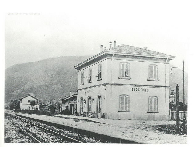 Veduta della stazione ferroviaria di Piaggione.